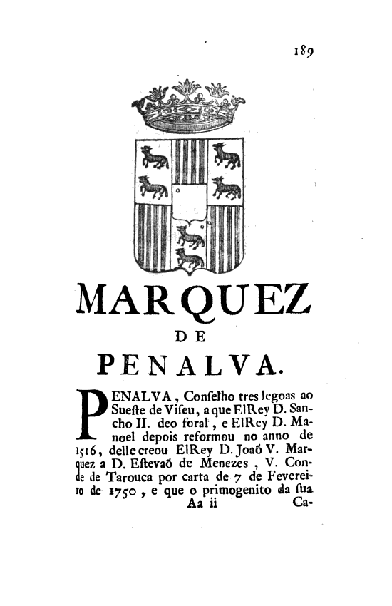 Página 189 das "Memorias Historicas e Genealogicas dos Grandes de Portugal" ― Título de Marquês de Penalva